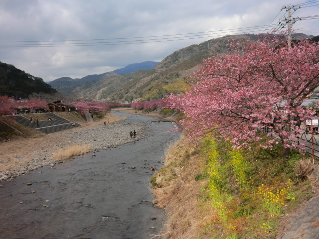 早春の河津川 2014/2/22撮影